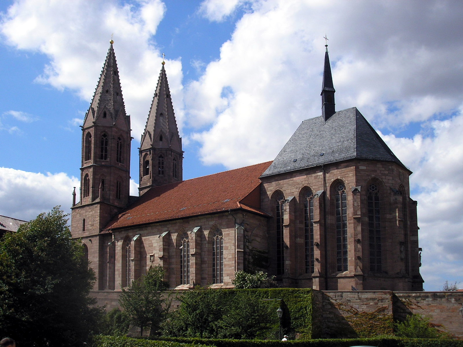 Die Kirche St. Marien in Heiligenstadt (Thüringen).